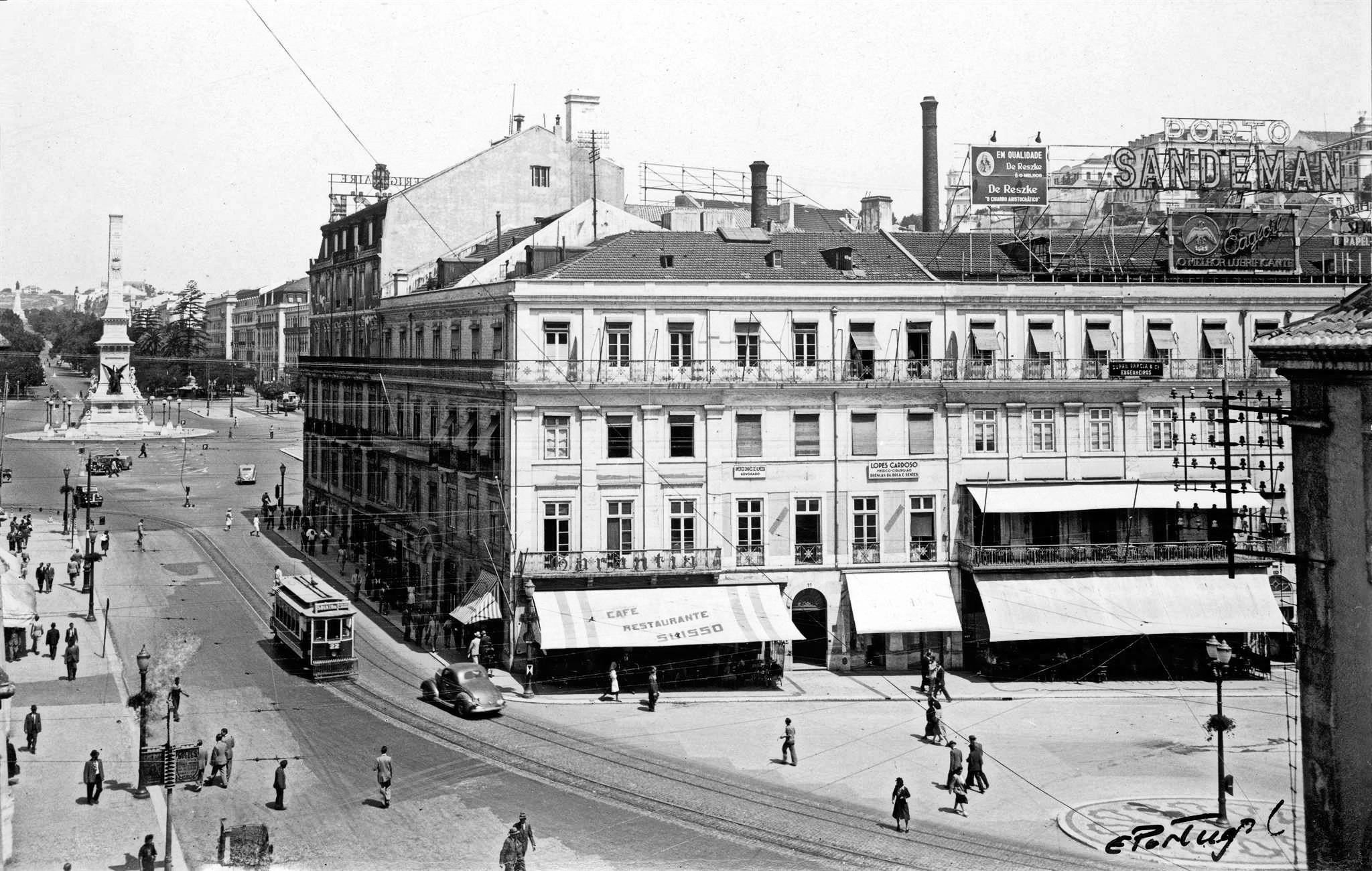 Bondes de Lisboa